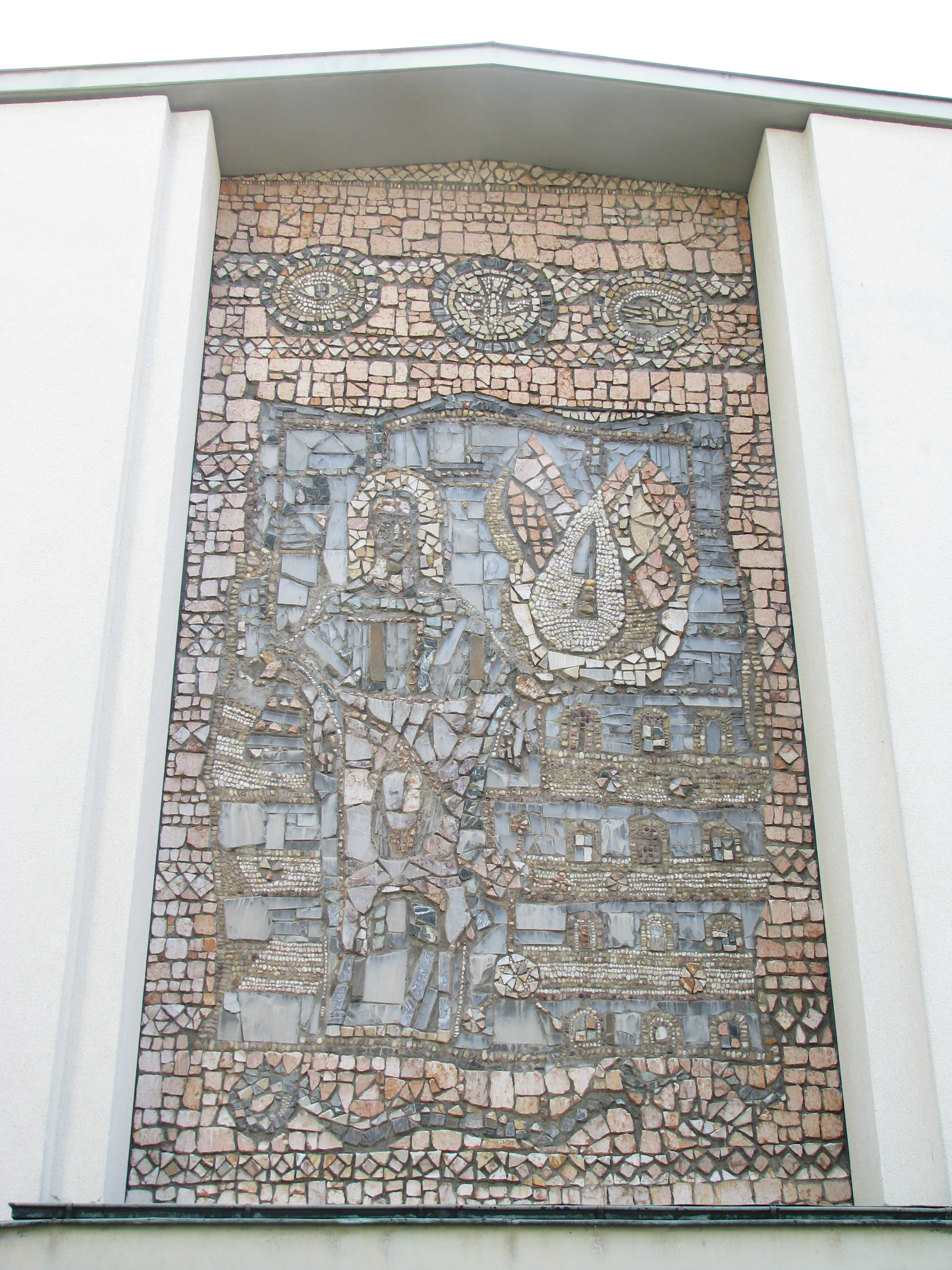 Der heilige Bartholomäus, Mosaik von Emil Wachter über dem Portal der Pfarrkirche St. Bartholomäus in Heidelberg-Wieblingen.